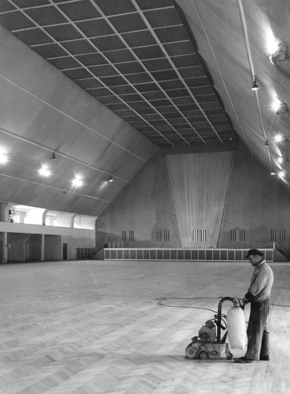 Erfurt, Thüringenhalle, Innenansicht Zentralbild Wittig 29.9.1957 Bay-Ku. Vorbereitung zu den Hallen-Handball-Weltmeisterschaften in der DDR. Im Rahmen der vorbereitenden Arbeiten zu den Weltmeisterschaften im Hallenhandball, die im Februar 1958 in der DDR ausgetragen werden, wird zur Zeit die Thüringenhalle in Erfurt neu gestaltet. In der Thüringenhalle werden einige Vorrundenspiele der Weltmeisterschaft durchgeführt. 1 270 qm Parkettfußboden wurden vom VEB Sägewerk Weimar neu verlegt, transportable Tribünen angefertigt, sodaß ungefähr 6 500 Zuschauer den Wettkämpfen beiwohnen können. Acht Umkleideräume wurden fertiggestellt und im Augenblick werden noch zwei Duschanlagen gebaut. UBz: Ein Blick in die Erfurter Thüringenhalle. Der Parkettleger Karl Berbig beim Parkettschleifen, dem letzten Arbeitsgang des Parkettlegens.